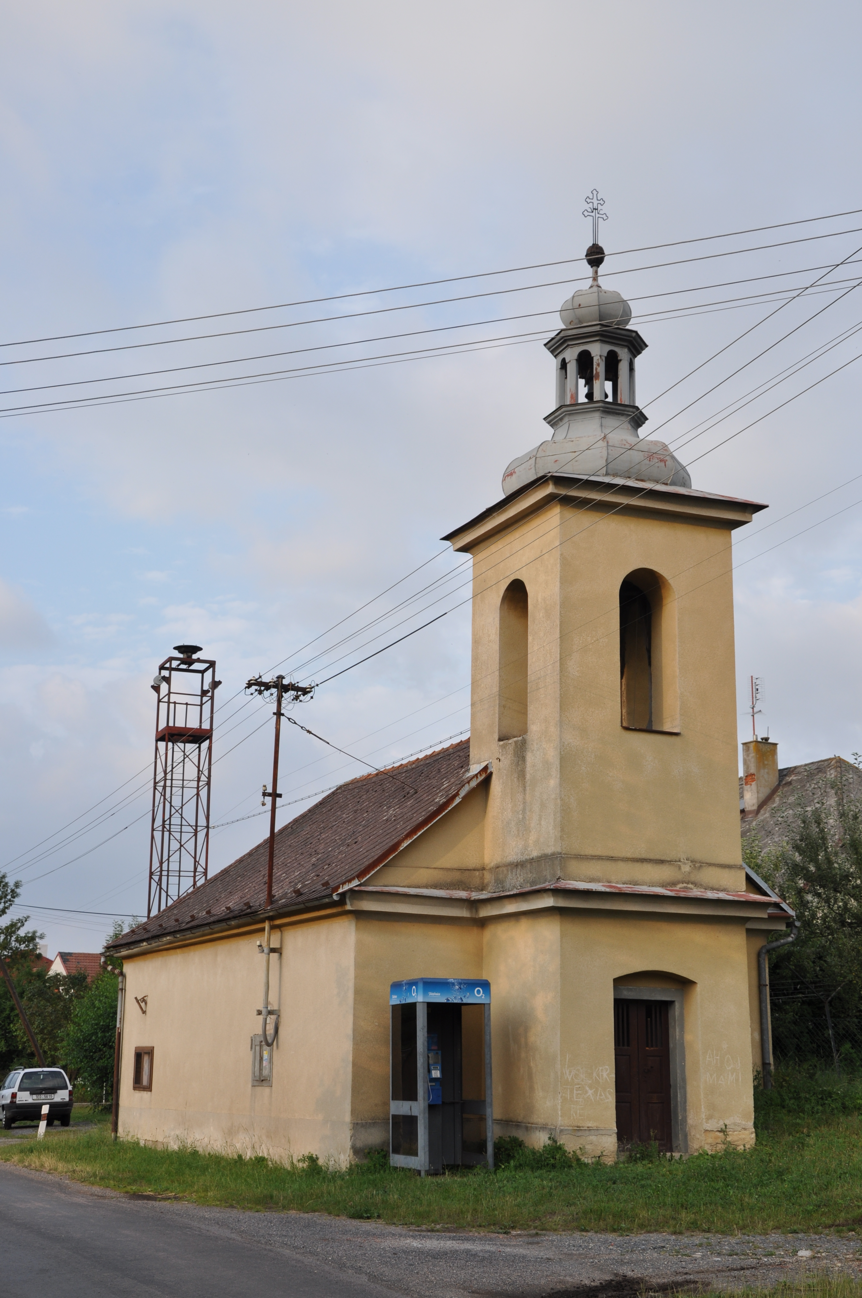 Luže-Radim, okres Chrudim. Kaplička a požární zbrojnice.